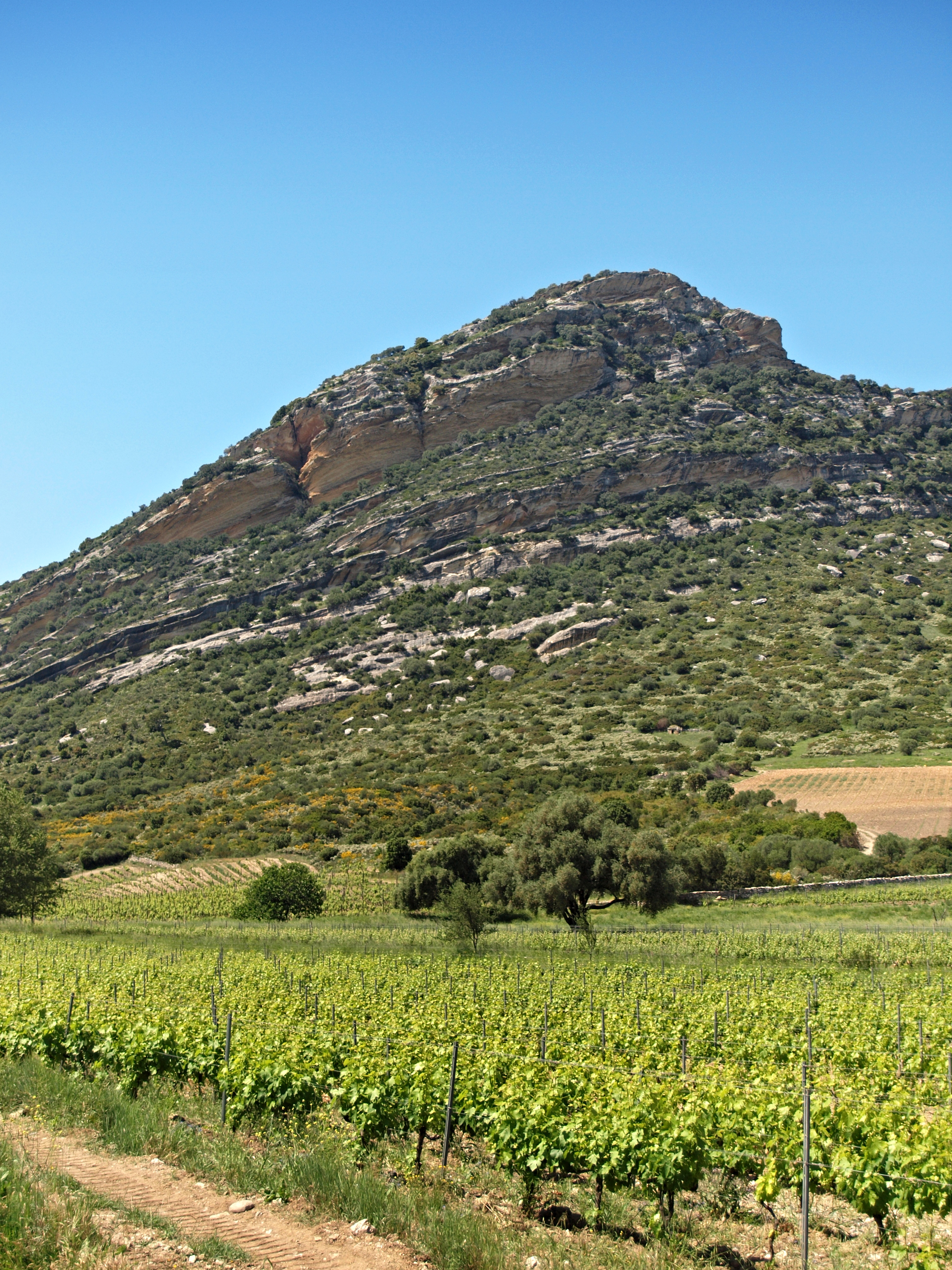 Poggio-d'Oletta, Nebbio (Corse) - Monte Sant' Angelo (354 m)